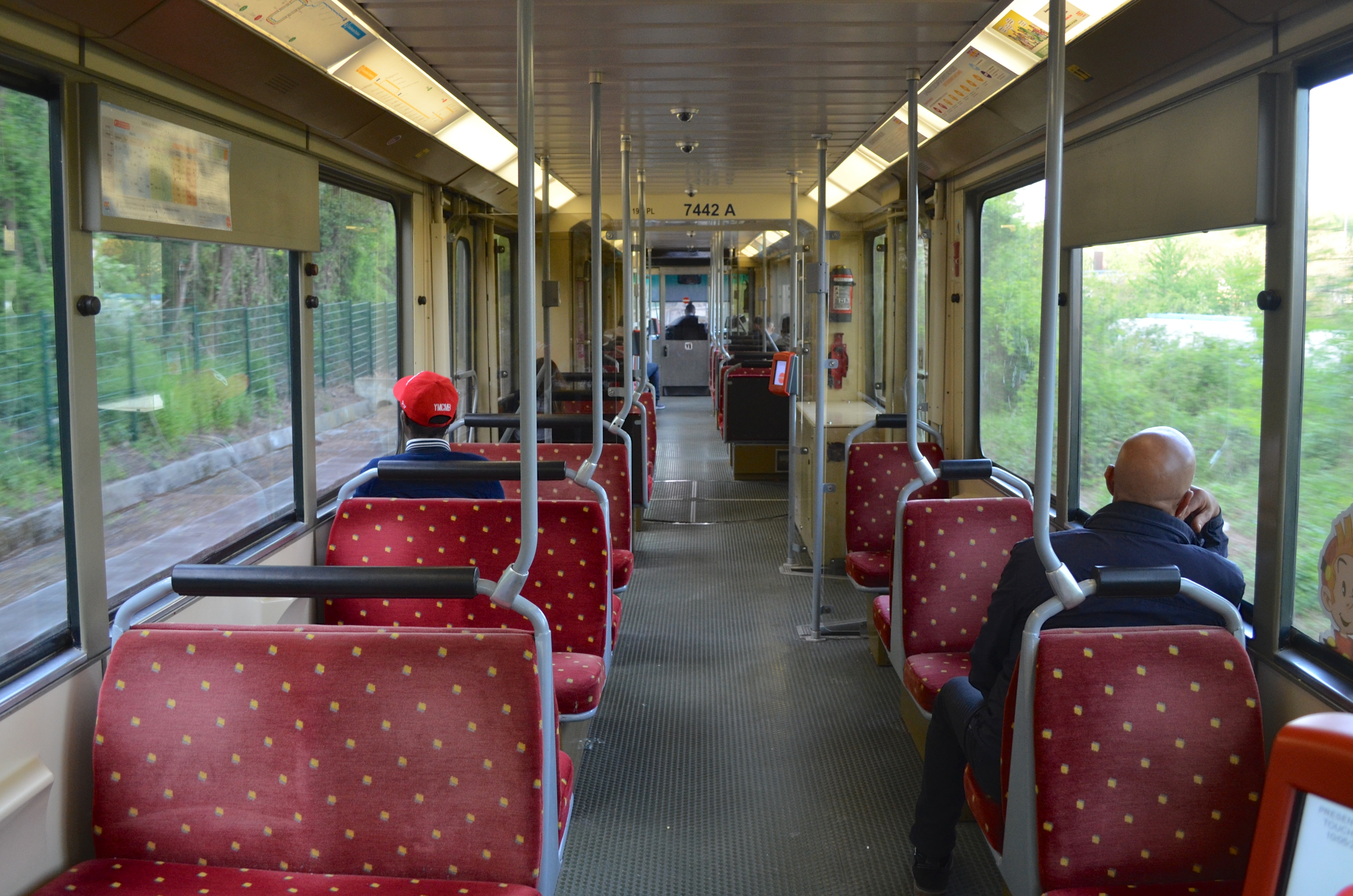 Métro léger de Charleroi - intérieur d'un véhicule (7442) - entre la station Piges et l'arrêt Sacré Madame.